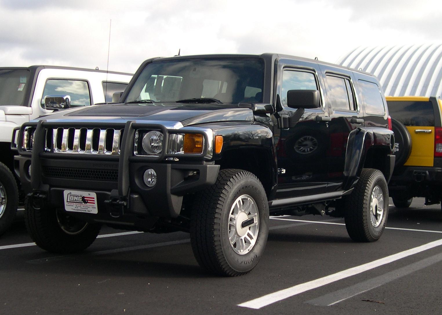 2006 Hummer H3